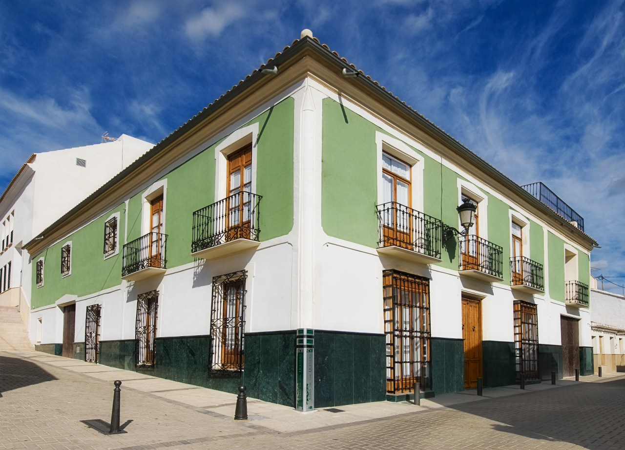 Vista general del edificio por la mañana